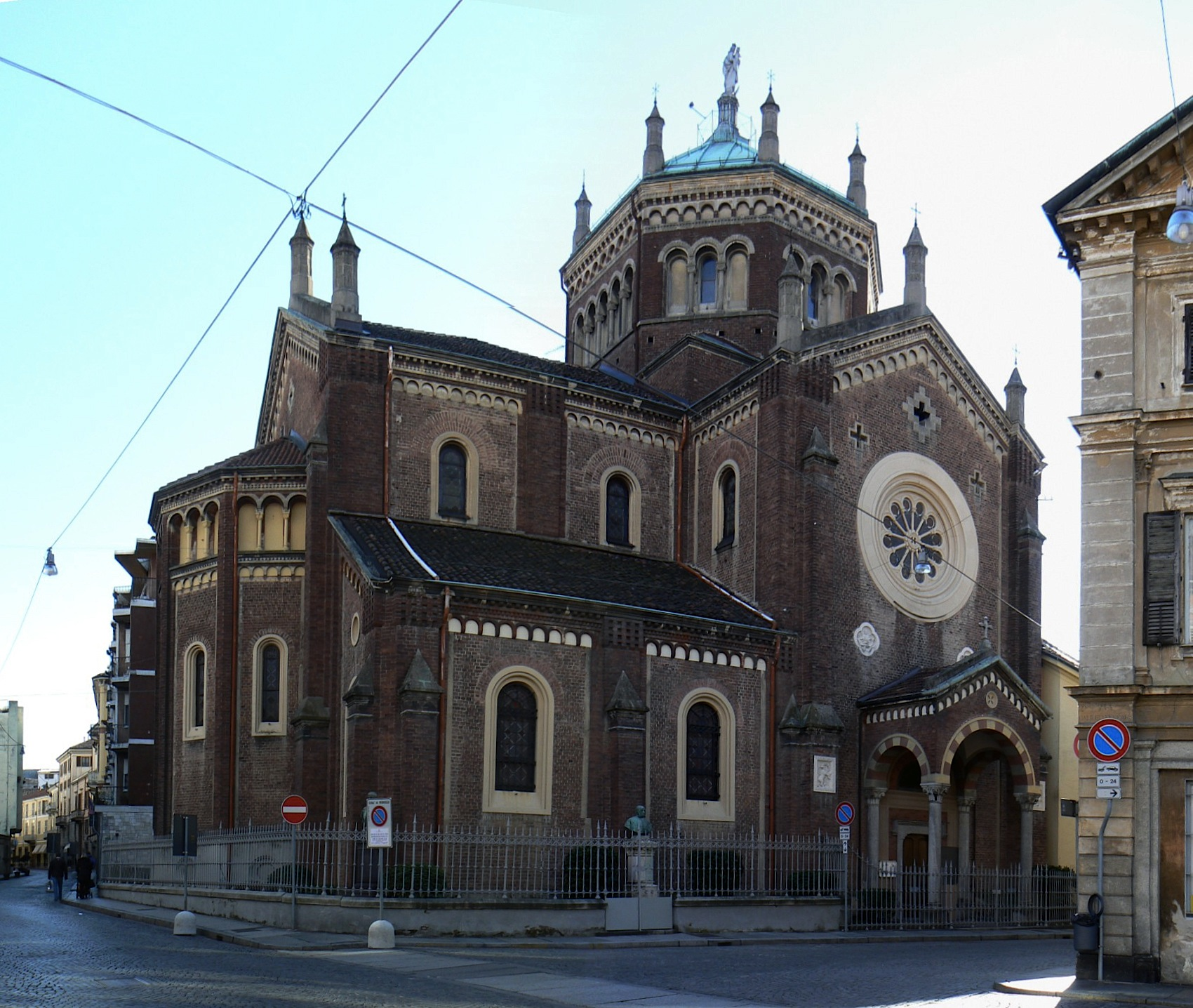 Chiesa di San Bernardo, Vercelli, Piemonte, Italia.